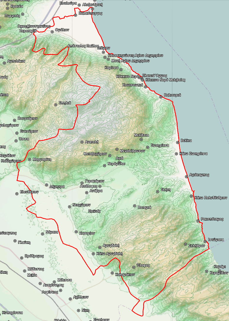 Τοπογραφικός χάρτης του Δήμου Αγιάς